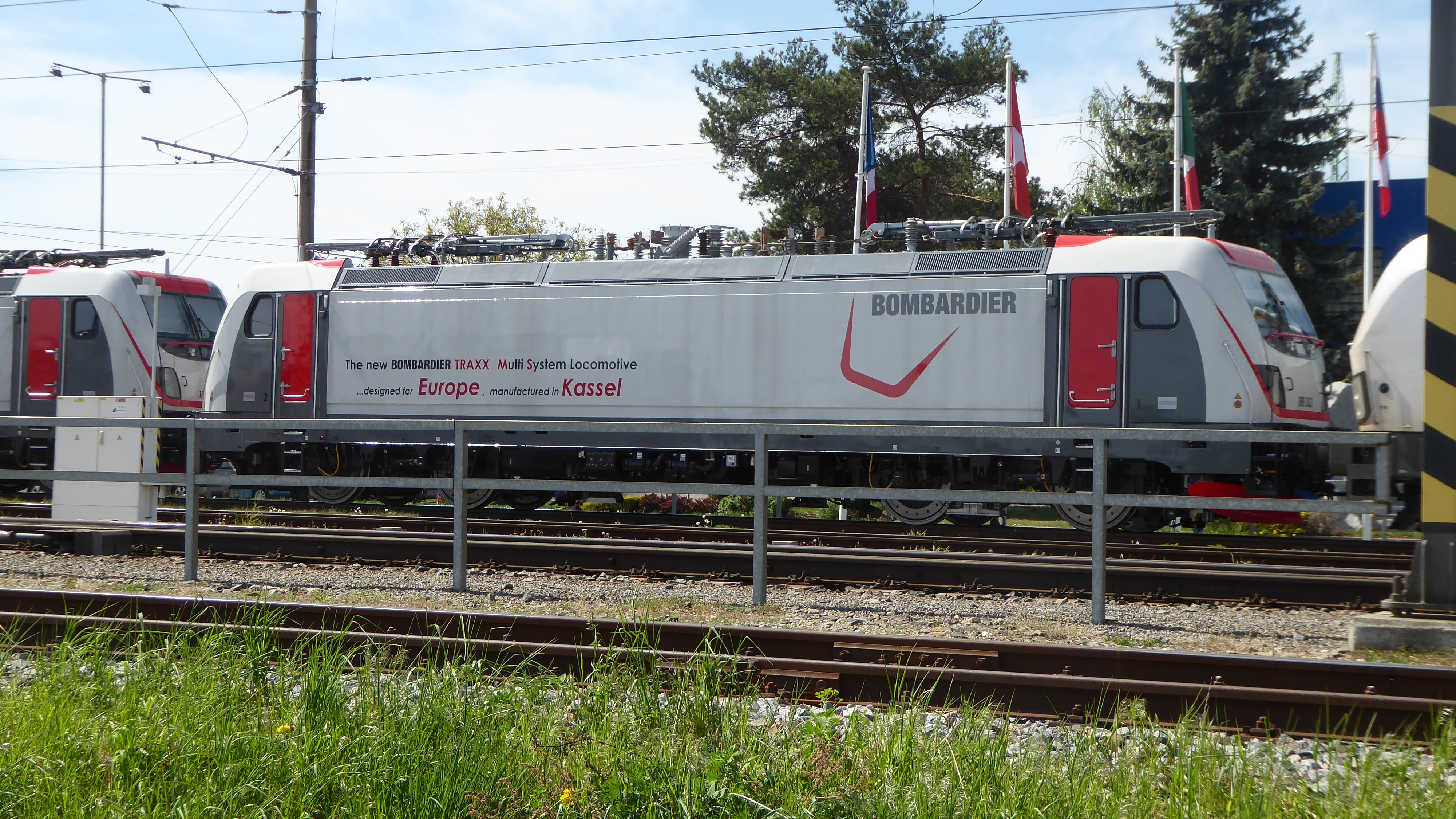 188 002 von TX Logistik mit der UIC-Nummer 91 80 6188 003-8 auf dem Eisenbahnversuchsring Velim